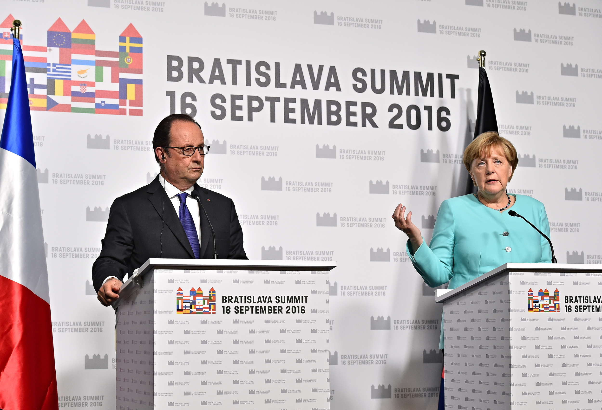 PRESS CONFERENCE MERKEL-HOLLANDE - BRATISLAVA SUMMIT 16. SEPTEMBER 2016 Photo Rastislav Polak